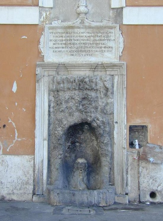 Fontana del Leone a San Salvatore in Lauro Roma, Italia